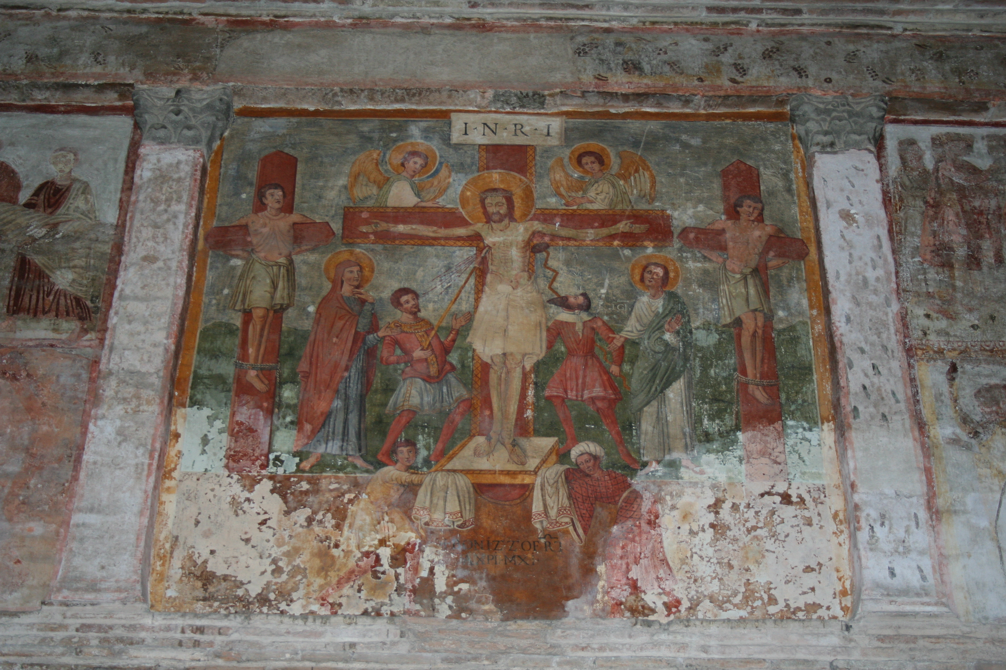 Crocifissione – Sant'Urbano alla Caffarella